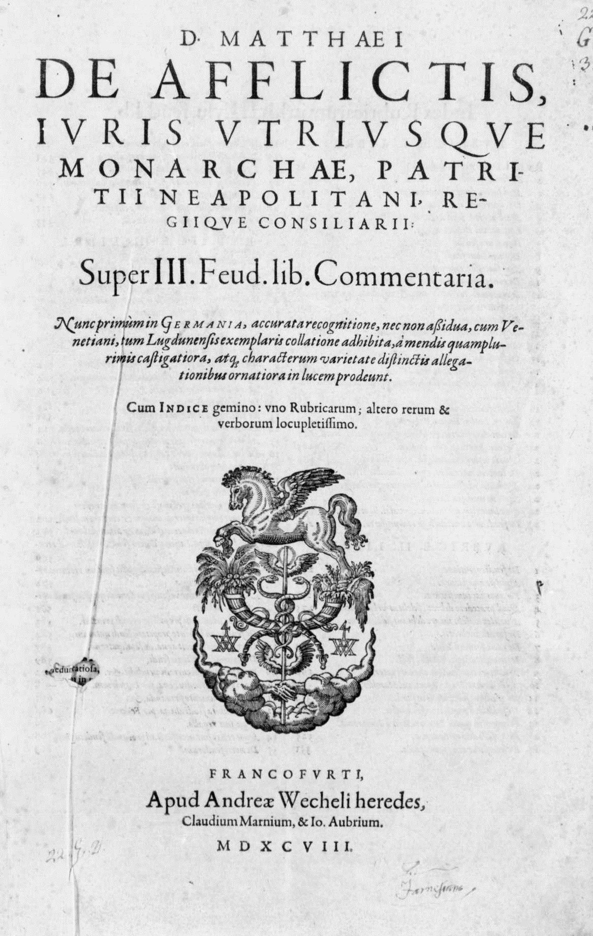 Frontespizio